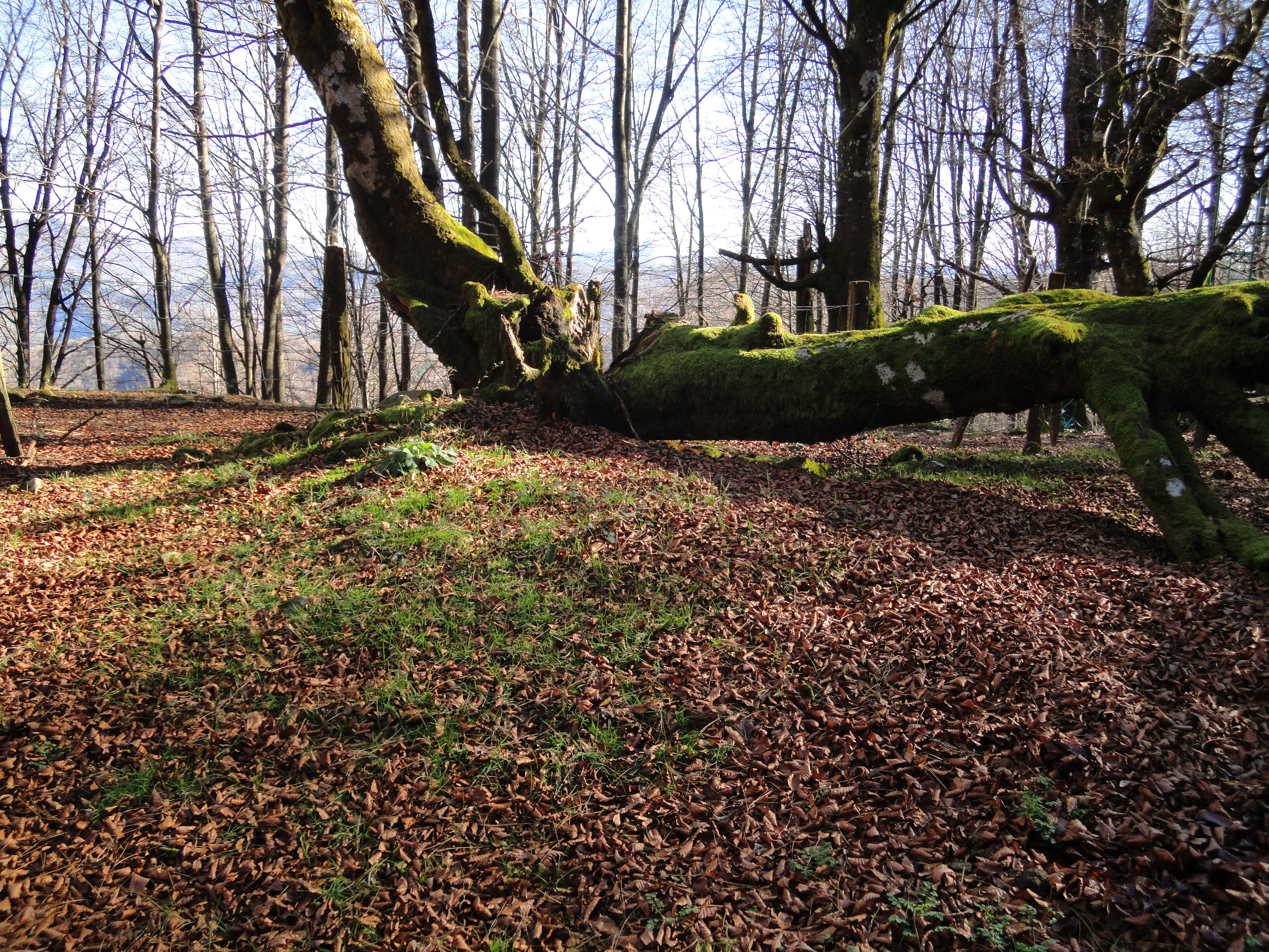 Aitxu trikuharria